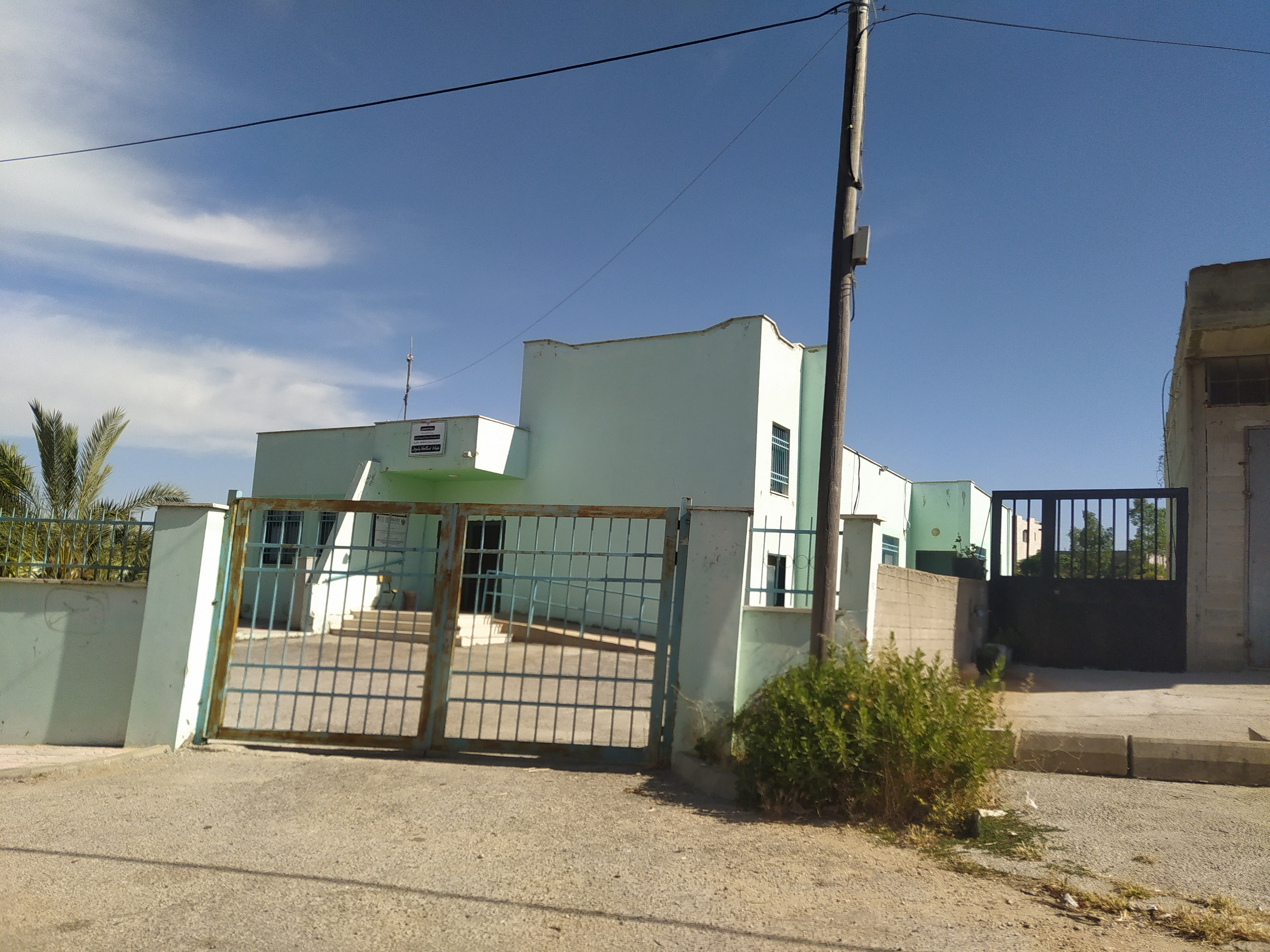 مبنى الرعاية الصحية الأولية في بلدتي اسكاكا ياسوف، وزارة الصحة الفلسطينية